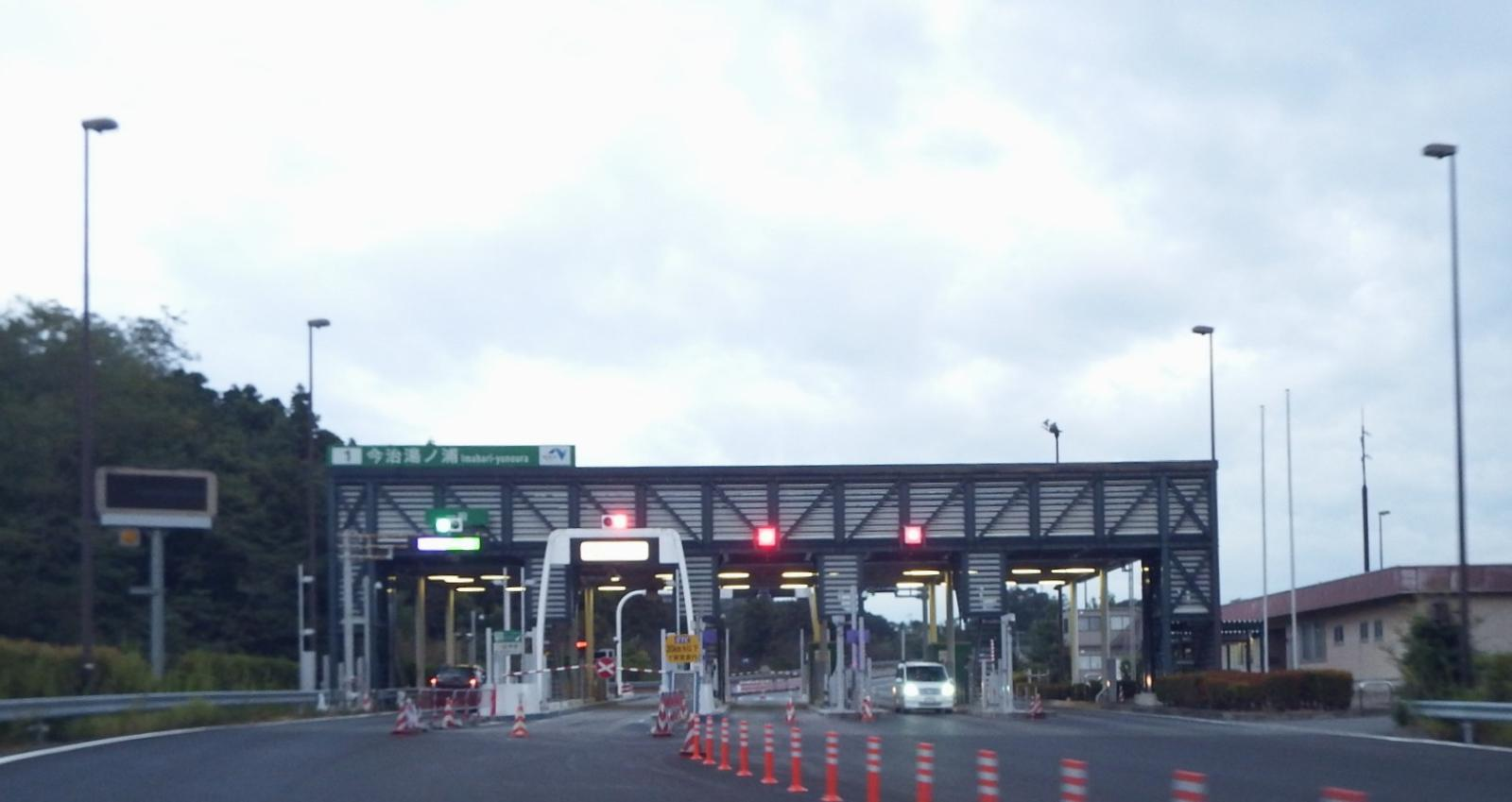 今治湯ノ浦インターチェンジ入口